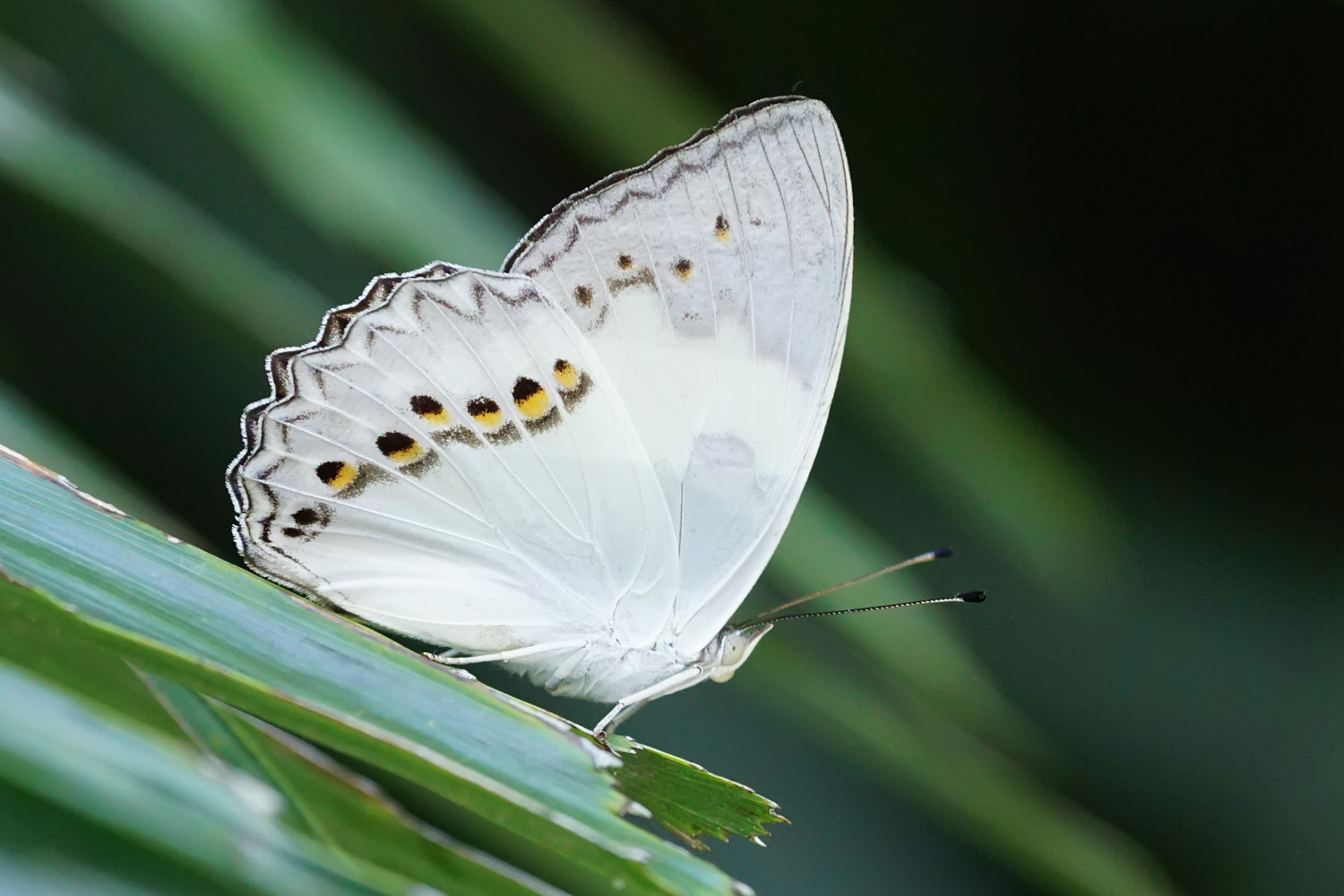 白蛺蝶（Helcyra superba takamukui）